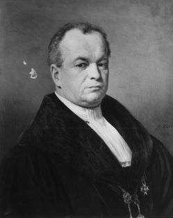 Bild in der Tübinger Professorengalerie